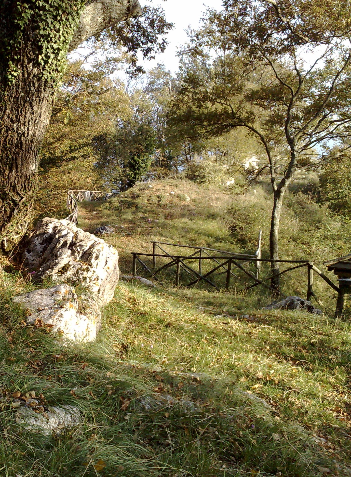 Ecco dove le mulattiere provenienti da Contrada e Forino si incontrano,nei pressi della chiesa dedicata all'Arcangelo.